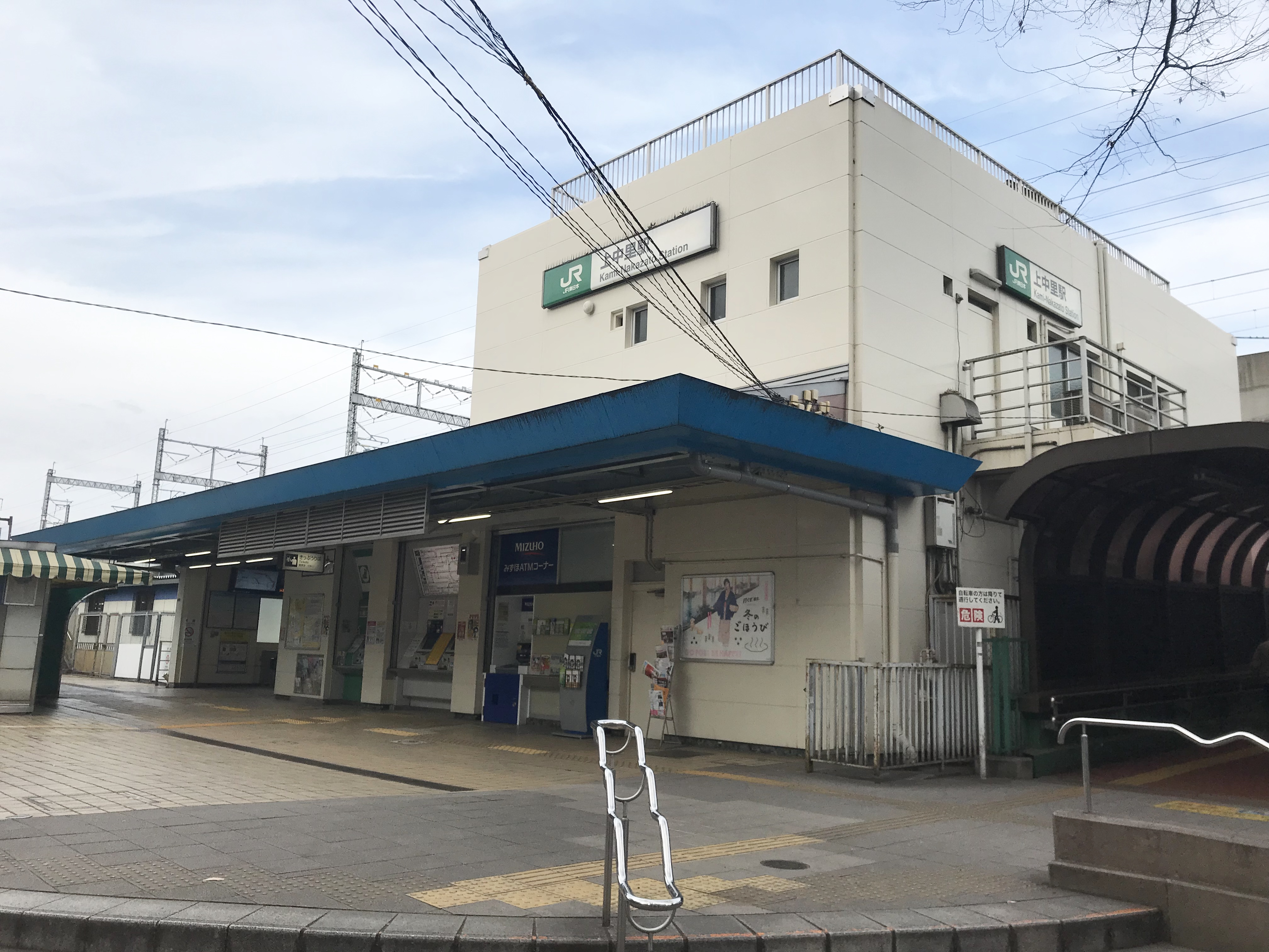 JR東日本京浜東北線上中里駅駅舎